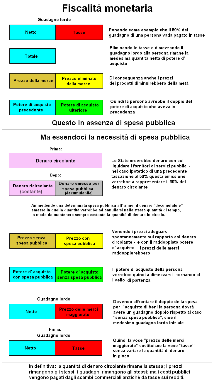 Sistema fiscale noto come fiscalità monetaria proposto dal poeta Ezra Pound e dal distributismo, credito sociale, Silvio Gesell